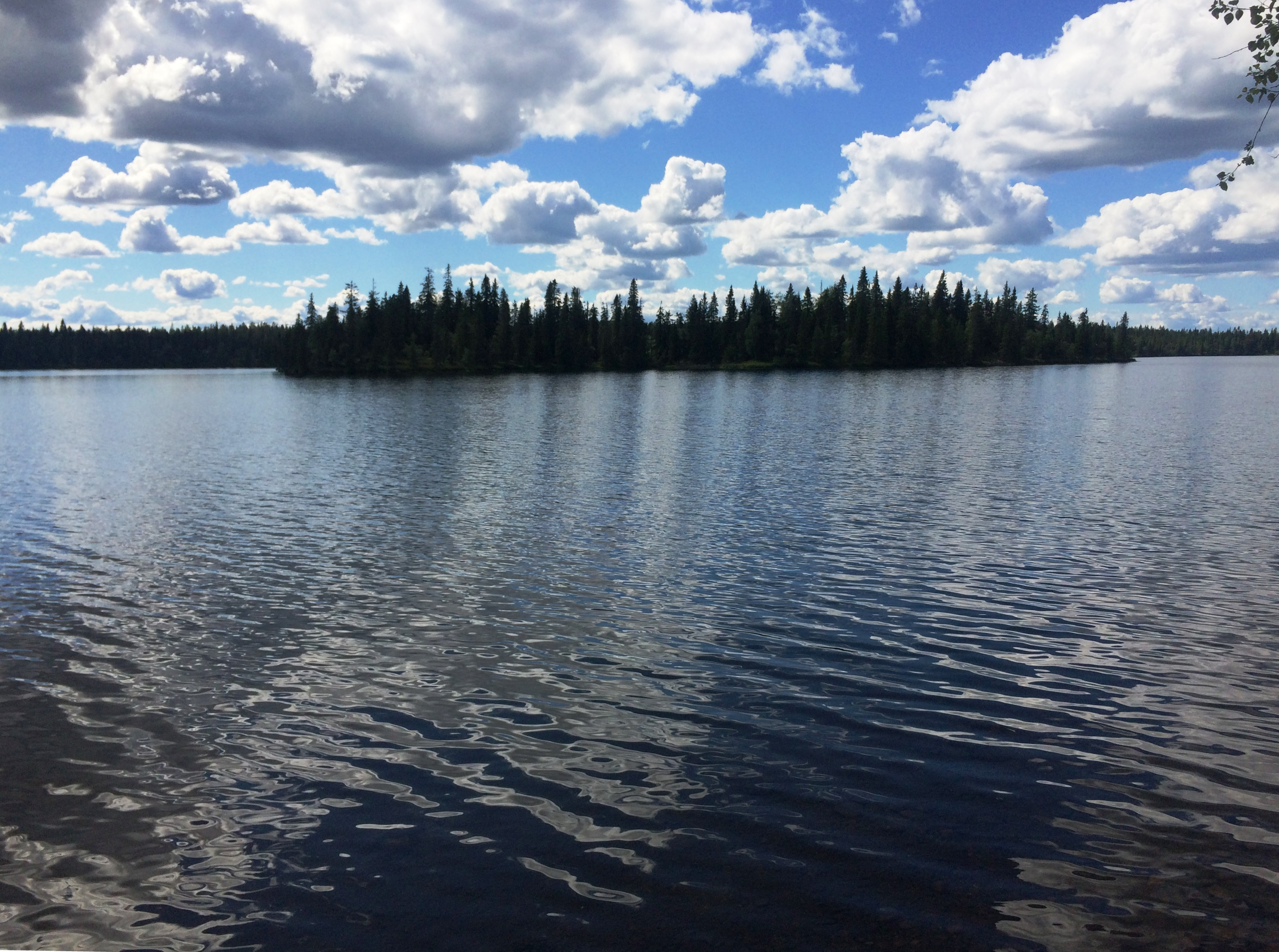 Кивиярви (озеро, Пенингское сельское поселение)